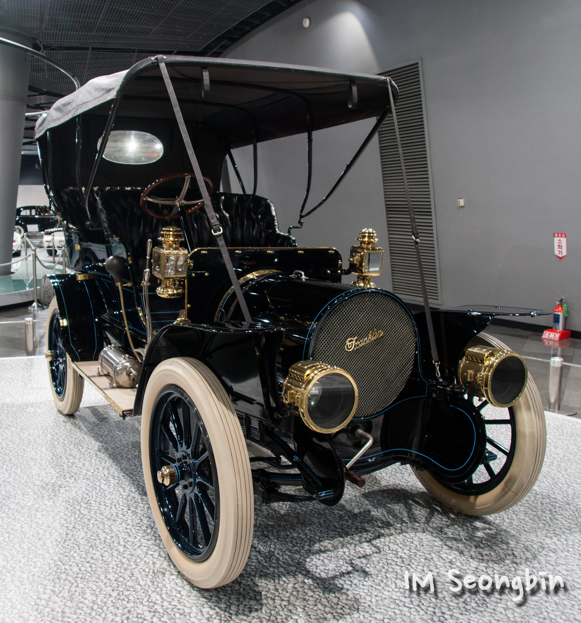 1910 Franklin Model G Touring